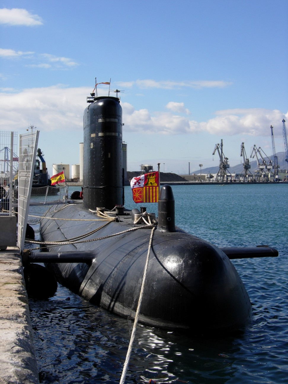 Submarino Tramontana (S-74), de la Armada Española en el puerto de Málaga